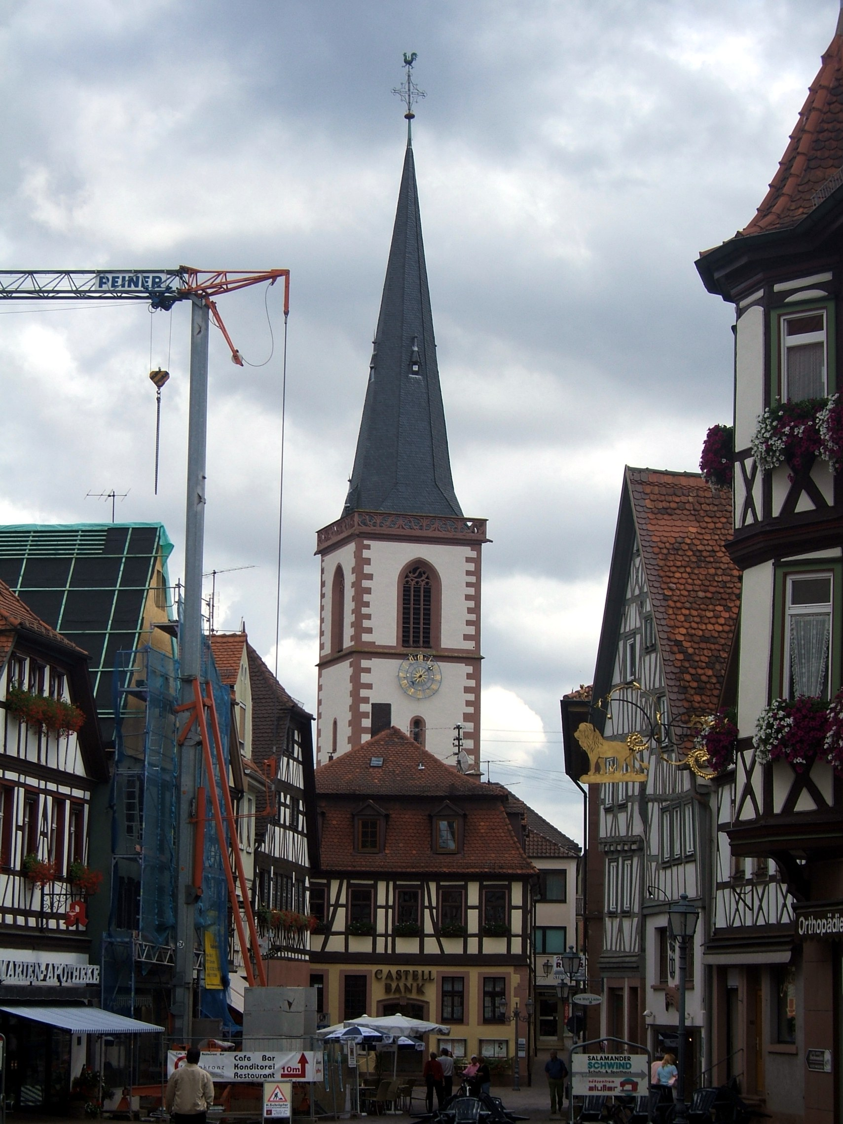 Hauptstraße mit Turm der St. Michaelskirche in Lohr.